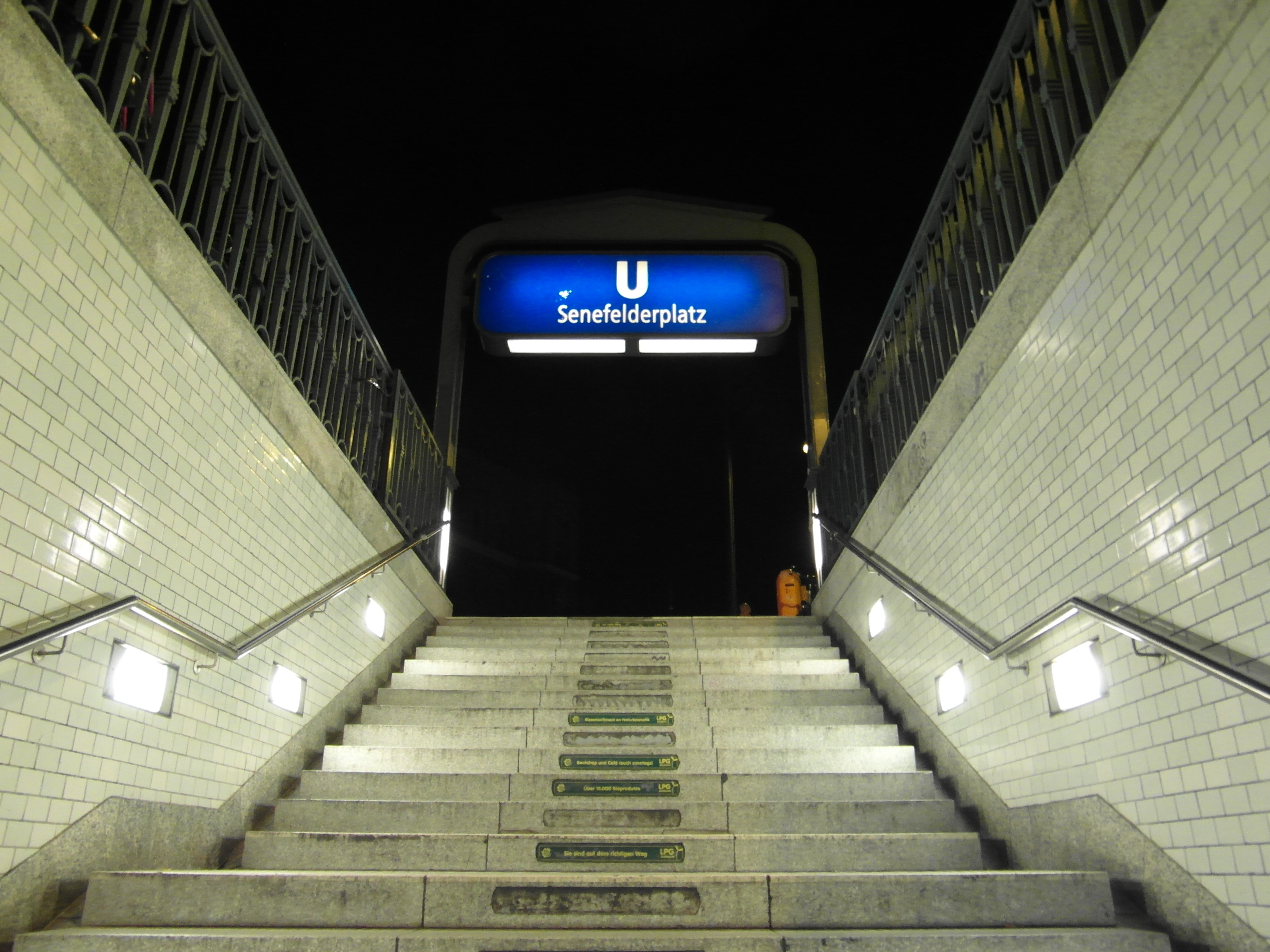 Linie U2